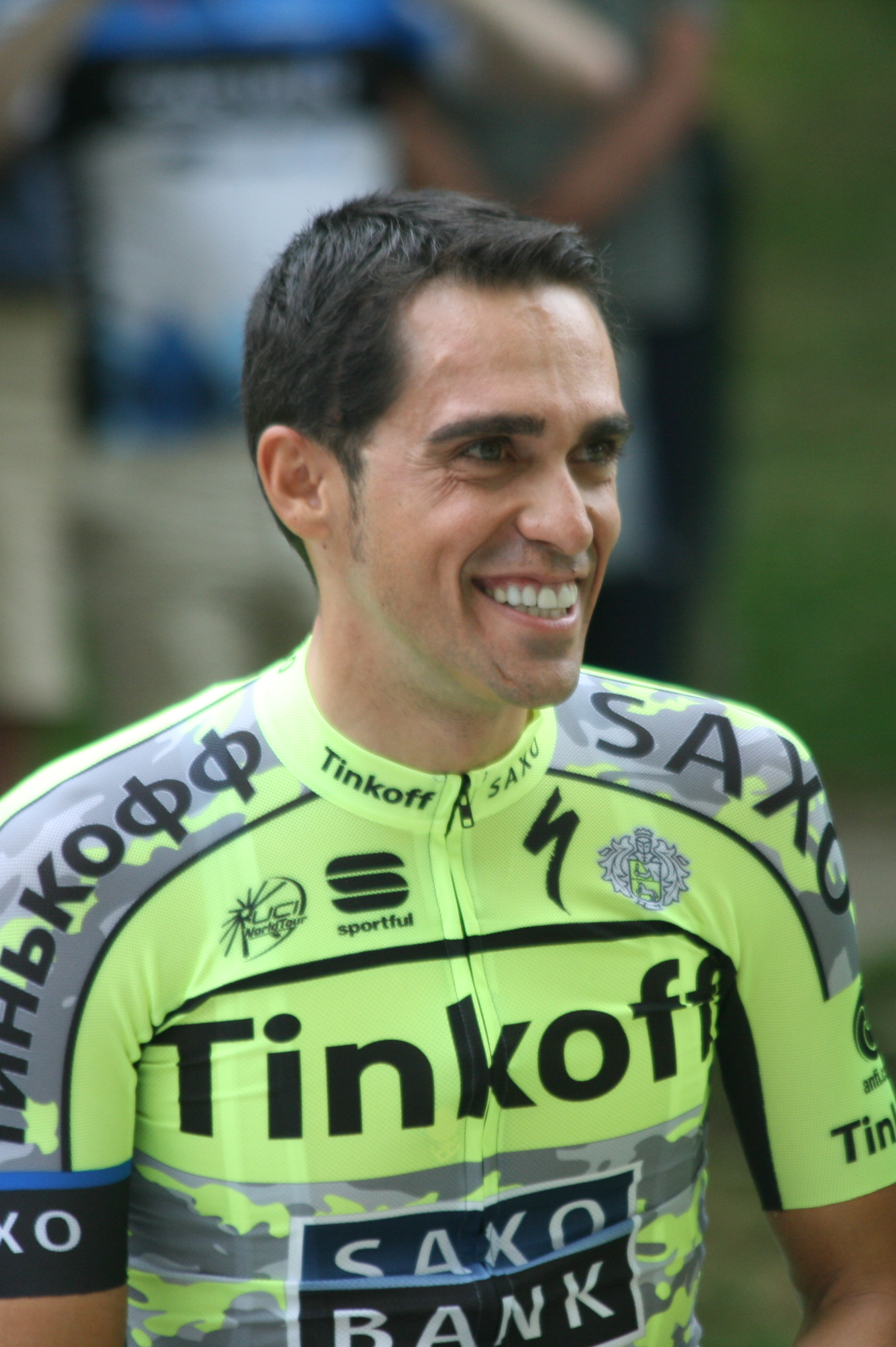 ploegenpresentatie Tour de France 2015 Utrecht